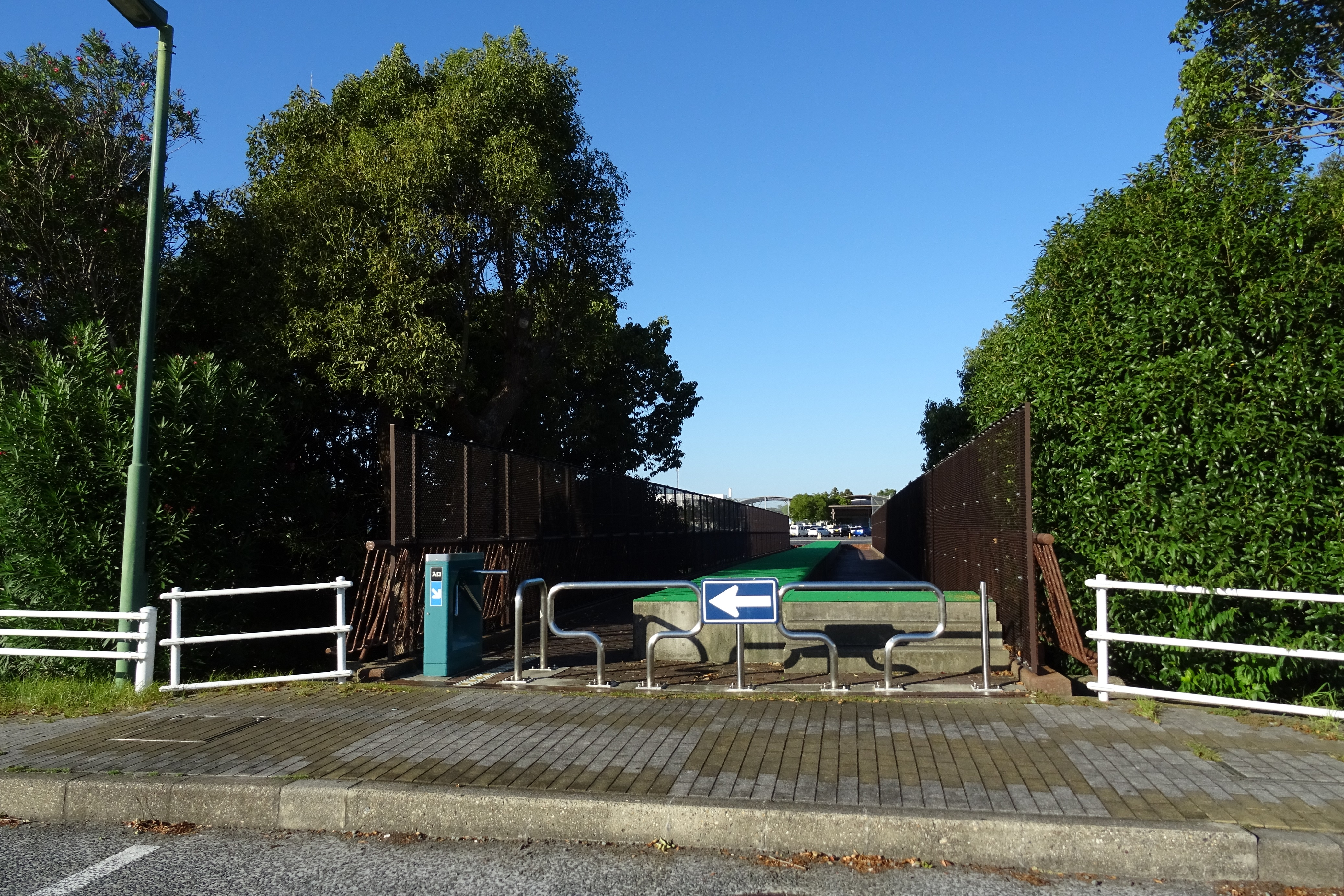 鉄橋